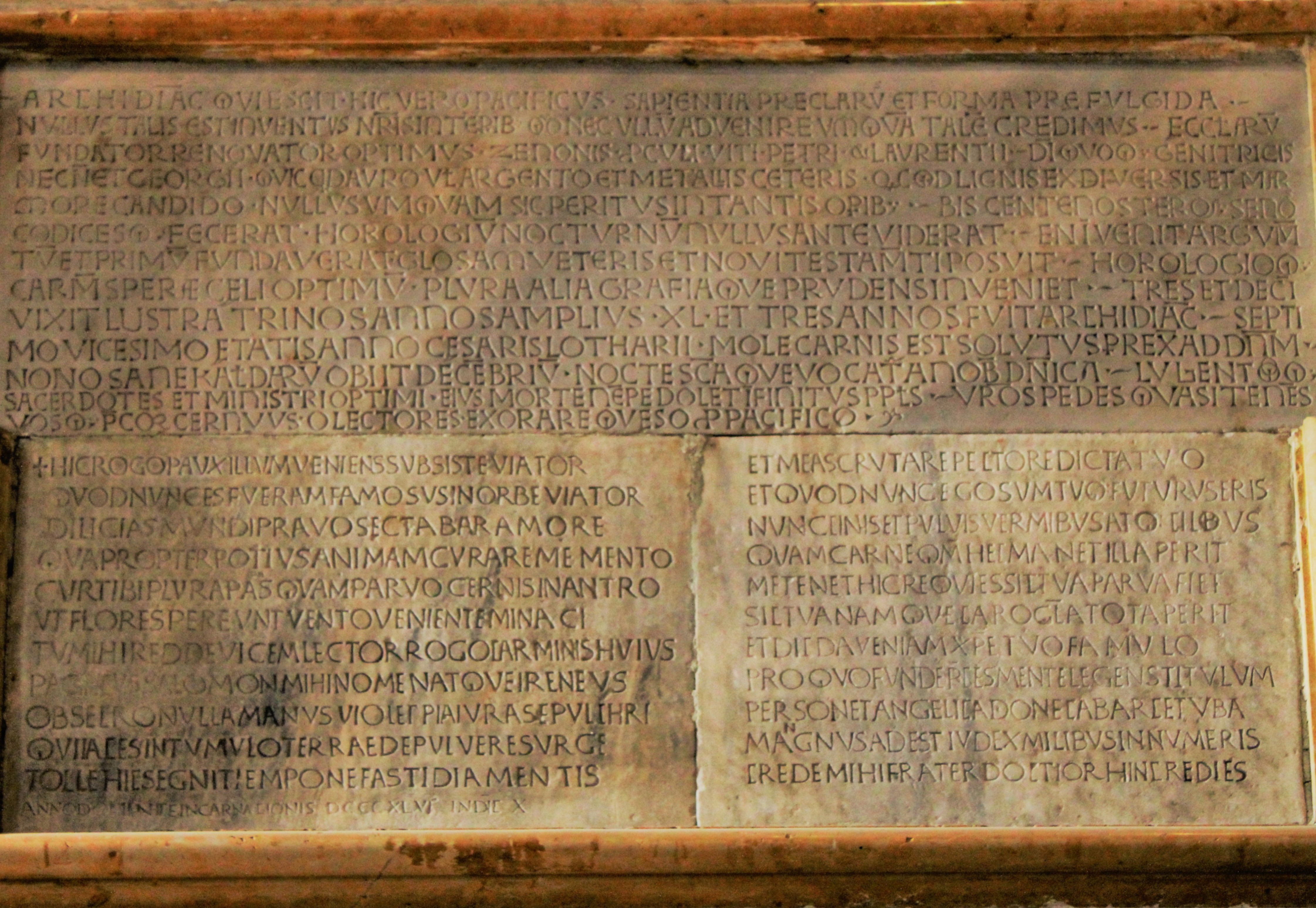 Lapide sepolcrale dell'Arcidiacono Pacifico presso il muro della navata di sinistra del Duomo di Verona